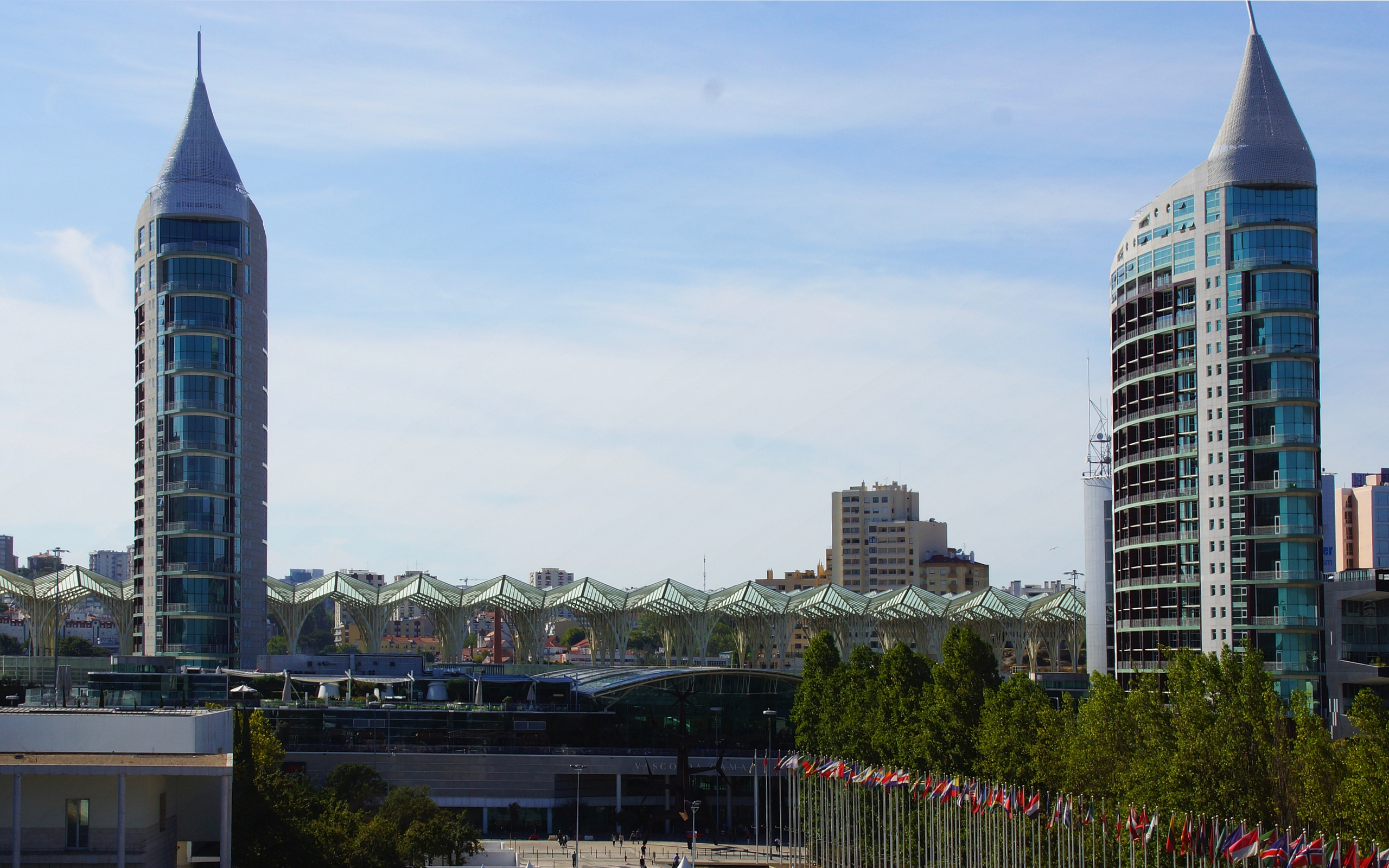 "Parque das Nações" mit den Torres São Rafael und São Gabriel je mit einer Höhe von 110 m, dahinter der futuristische Bahnhof Gare Estação do Oriente (Fertigstellung zur Expo '98) in Lissabon Portugal Foto Wolfgang Pehlemann DSC00311